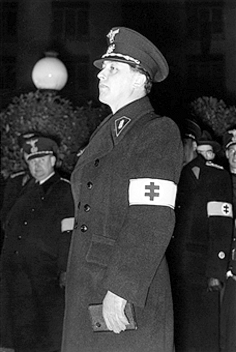 Alexander Mach (1902 – 1980), politik, hlavný veliteľ Hlinkovej gardy, podpredseda vlády a minister vnútra v období vojnovej Slovenskej republiky (1939-1945). Za zločiny proti ľudskosti, roku 1947 odsúdený na 30 rokov väzenia. Digitalizácia fotografie z dobovej tlače.